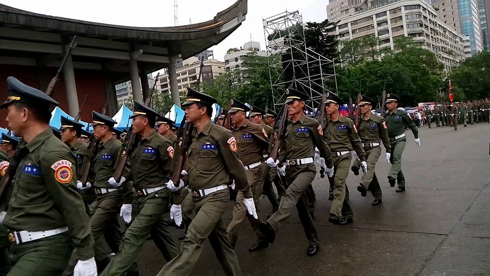 我愛國旗嘉年華-正步操演